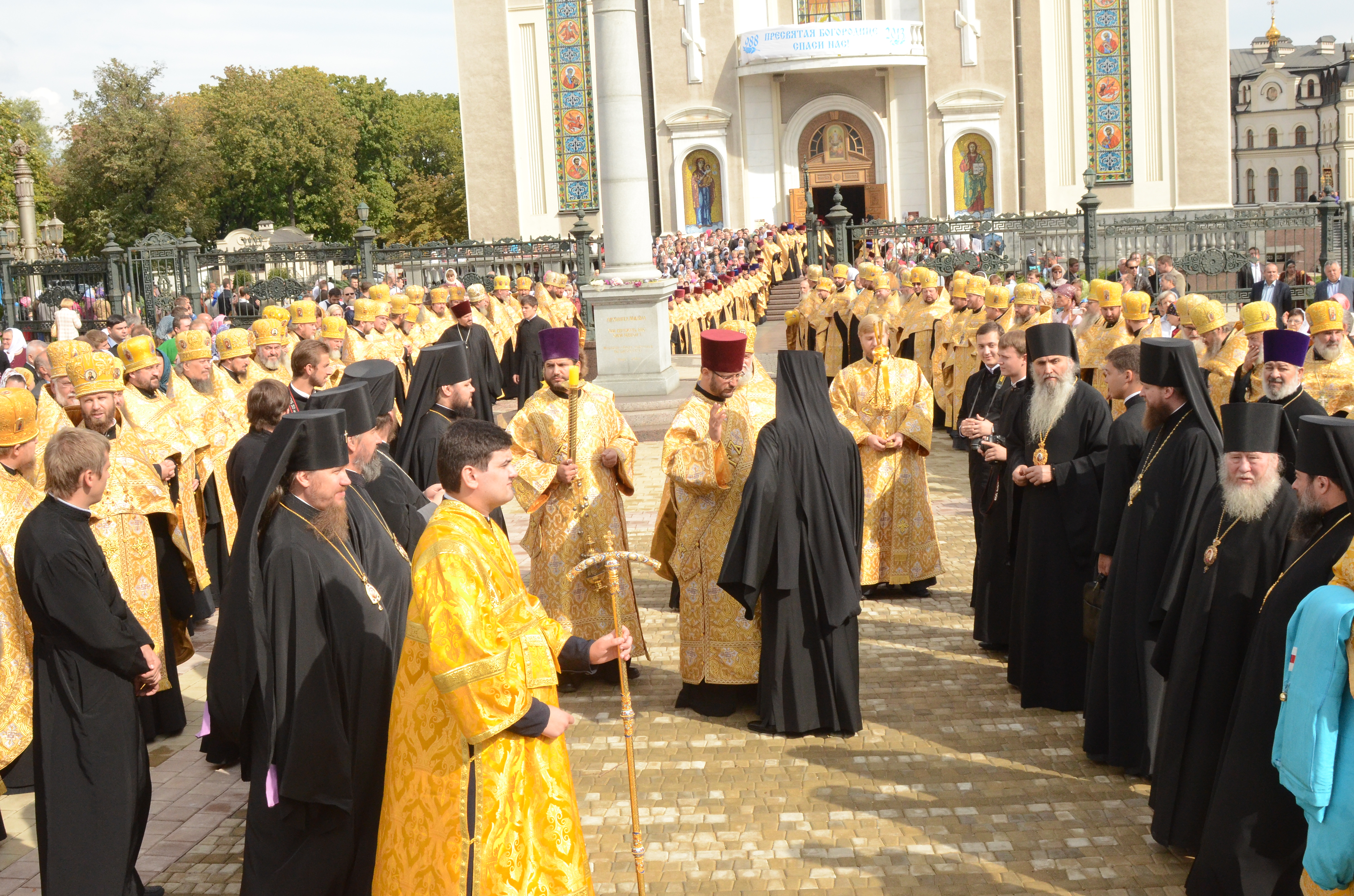 Донецк. Свято-Преображенский собор. Освящение памятника Андрею Первозванному